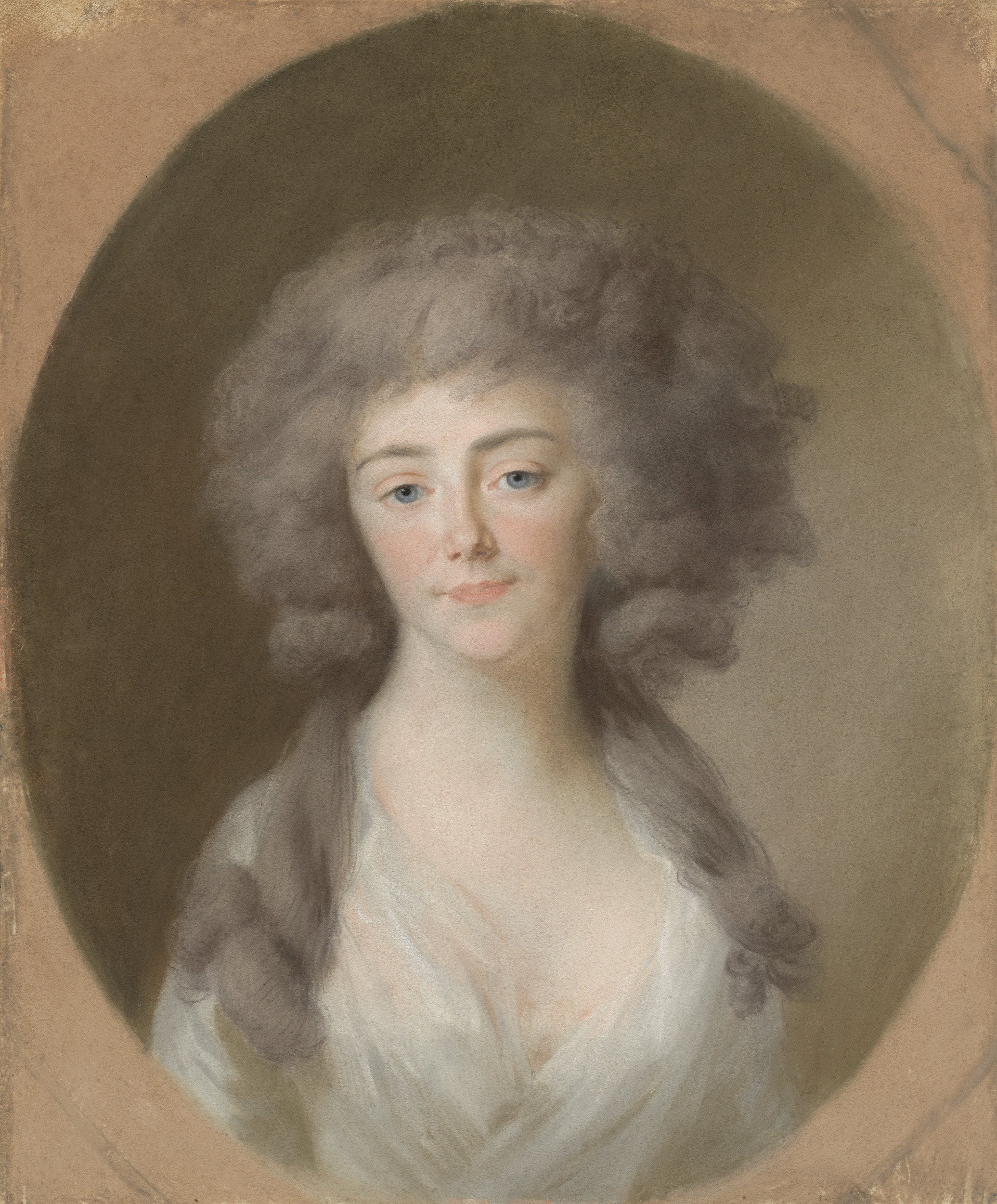 Portret van Louisa Isabella Alexandrina Augusta von Kirchberg (1772-1827). Echtgenote van Frederik Willem, vorst van Nassau-Weilburg, en schoonzuster van Augusta Maria Carolina van Nassau-Weilburg. Zuster van prins Willem V. Ten halven lijve, en face. Maakt deel uit van een reeks van negen portretten van prinsen en prinsessen uit het huis van Oranje-Nassau (SK-A-408/416). Onderdeel van de collectie pastels.